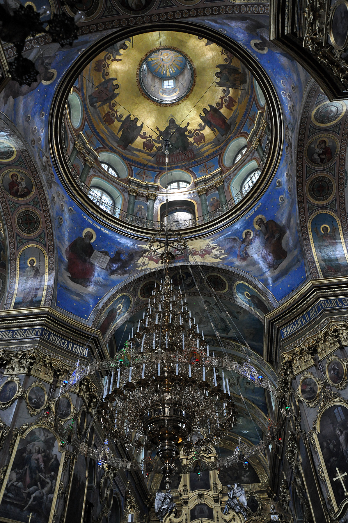 Успенський собор, Почаїв, пл. Возз'єднання